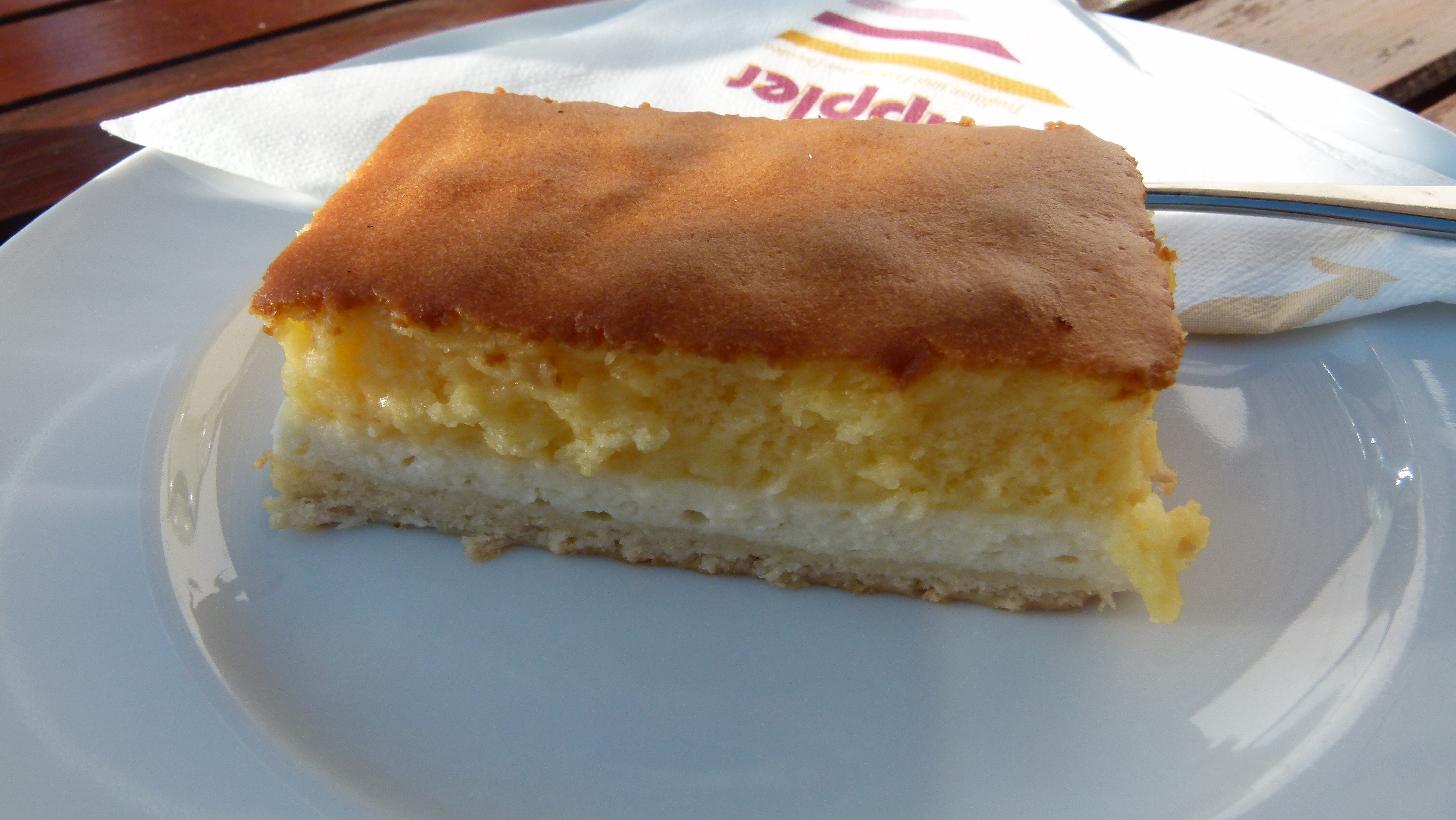 Dresdner Eierschecke - Bäckerei Wippler in Pillnitz, Dresden